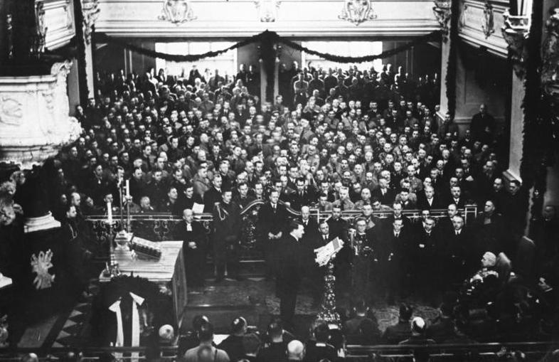 Reichspräsident von Hindenburg tot! Der historische Tag von Potsdam am 21. März 1933. Reichspräsident von Hindenburg in der Garnisonkirche während der großen Rede Adolf Hitlers.